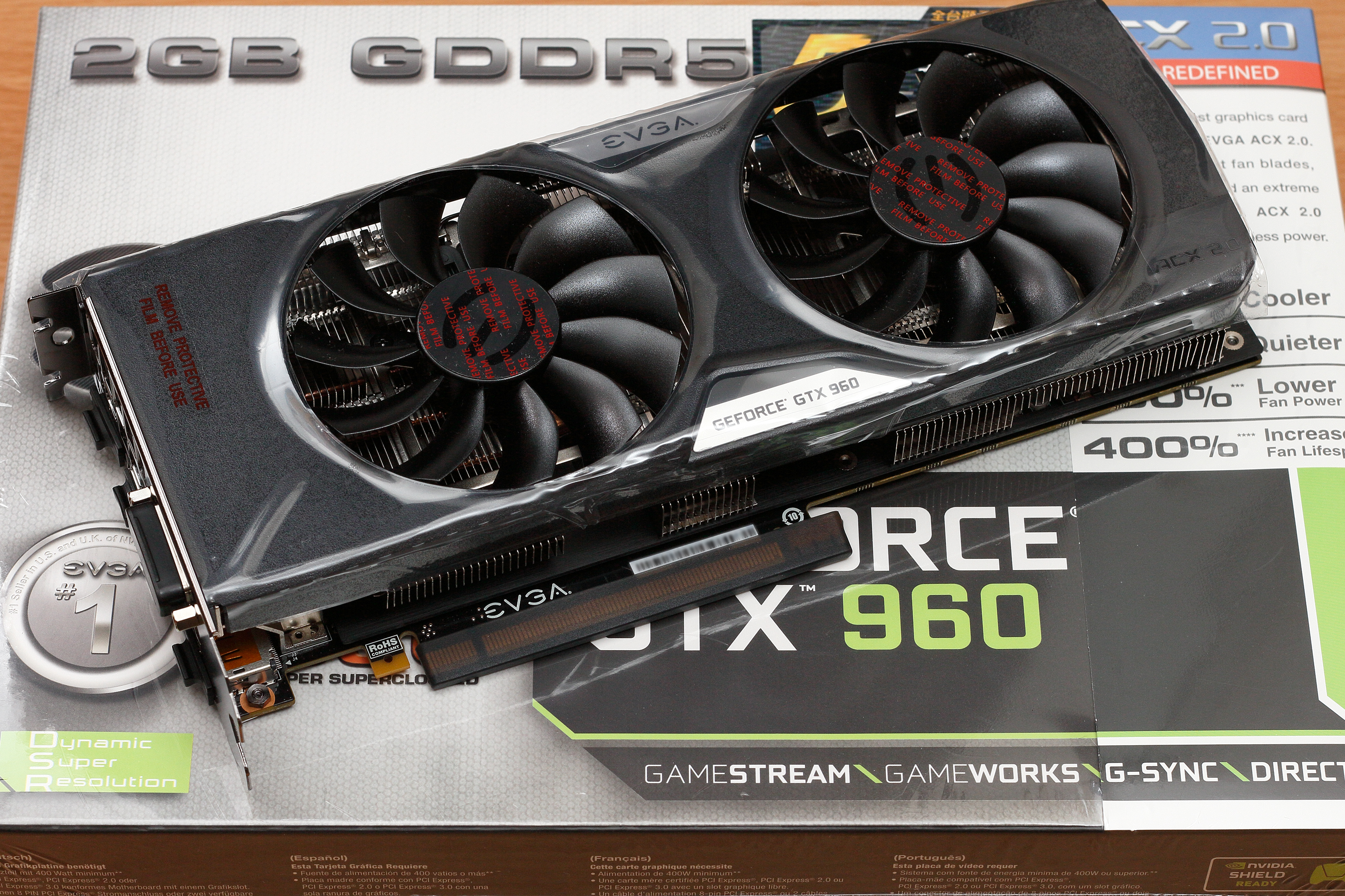 EVGA GeForce GTX 960 SuperSC ACX 2.0+顯示卡，型號為02G-P4-2966-KR。